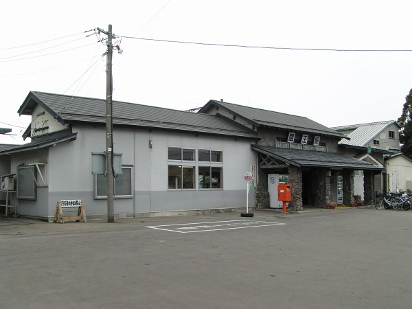 Zao Station, Yamagata, Yamagata, Japan